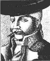 Tragabuches, tel qu'il est traditionnellement représenté, coiffé d'un foulard et d'un chapeau et fumant le cigarillo.